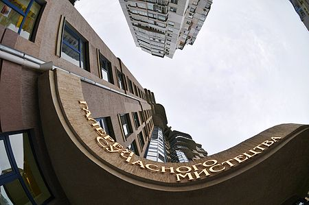 Galery NT-Art